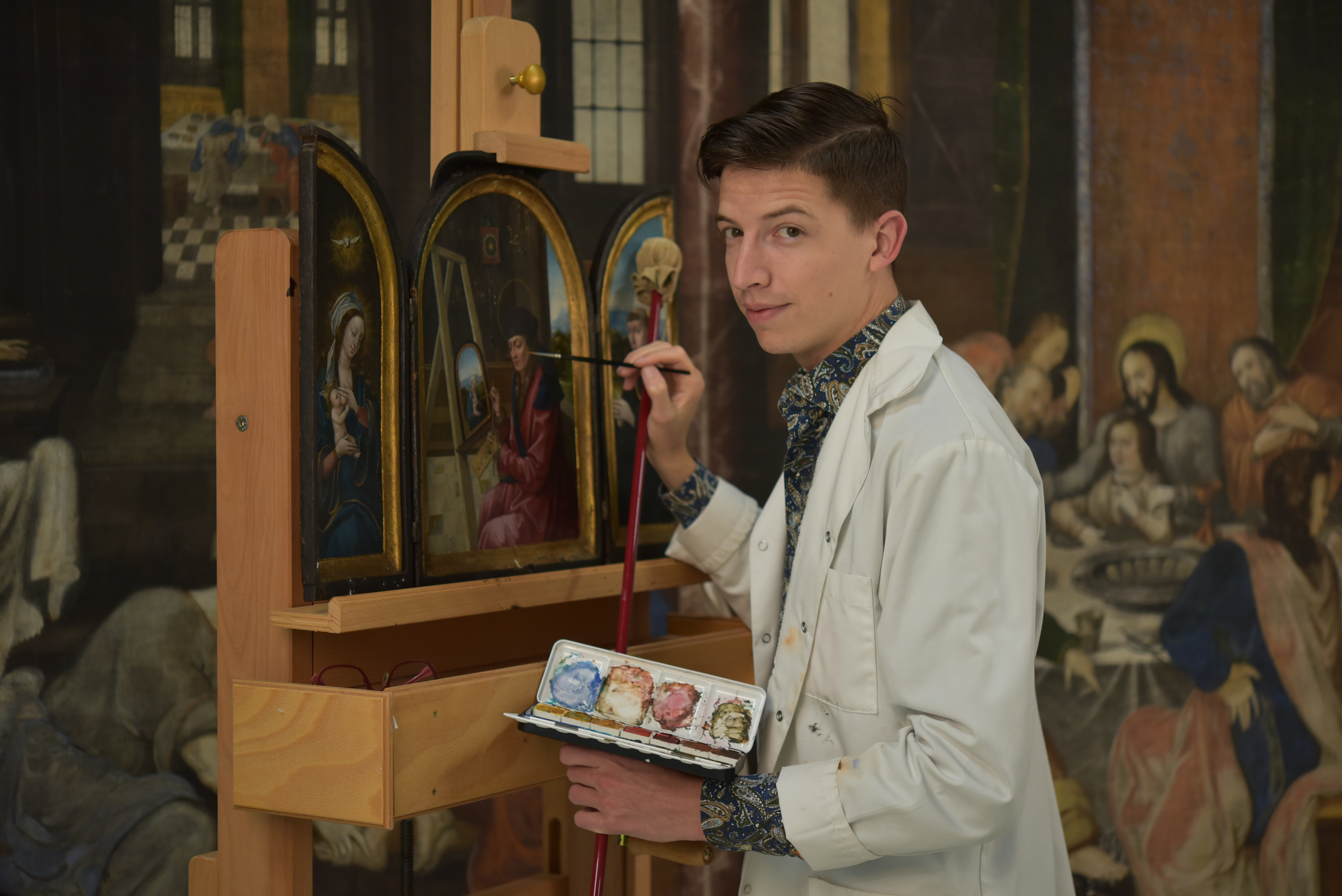 Sven Van Dorst restaureert het 16de-eeuwse triptiekje met 'Sint-Lukas schildert de Madonna'.